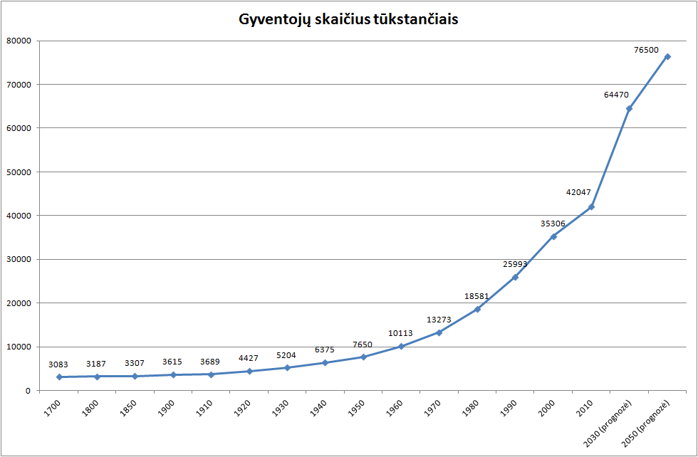 Grafike vaizduojama Tanzanijos gyvntojų skaičiaus kitimo statistika nuo 1700 iki 2010 ir prognozės.